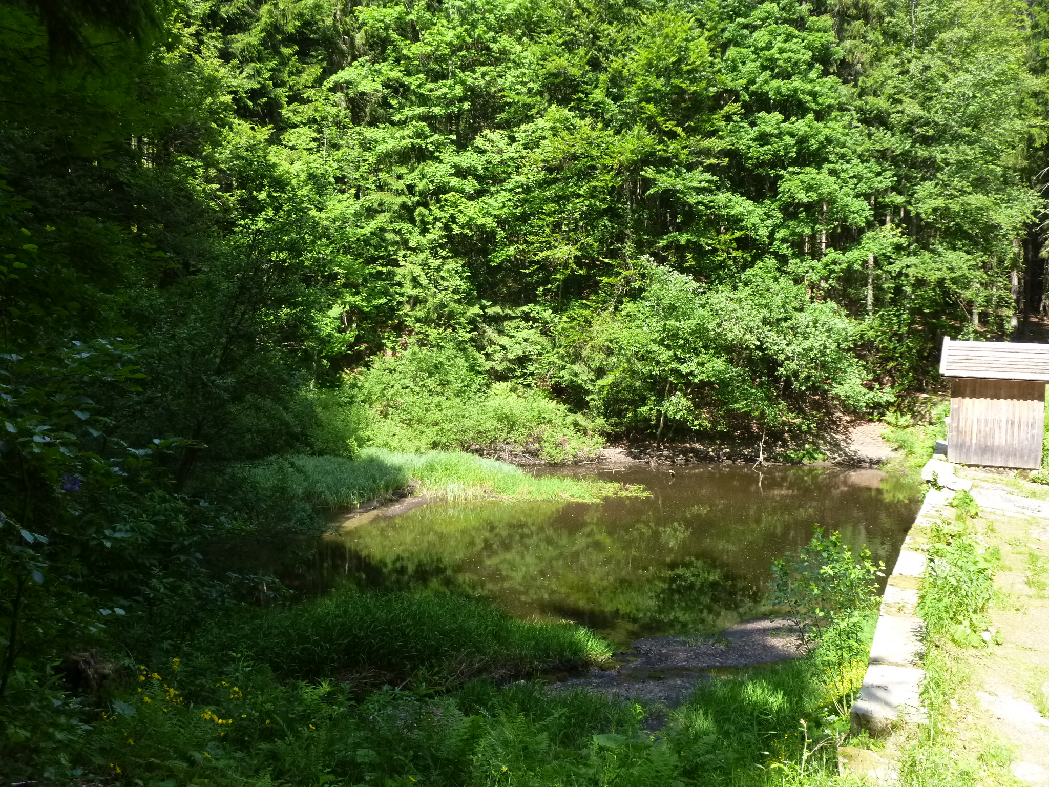 Die Teufelsbachklause bei Finsterau im Nationalpark Bayerischer Wald ist ein gestauter Triftweiher, der früher zur Holztrift benutzt wurde.